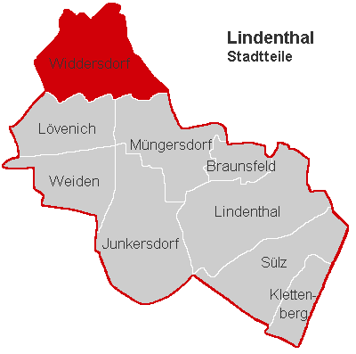 Lagekarte Widdersdorf im Stadtbezirk Köln-Lindenthal